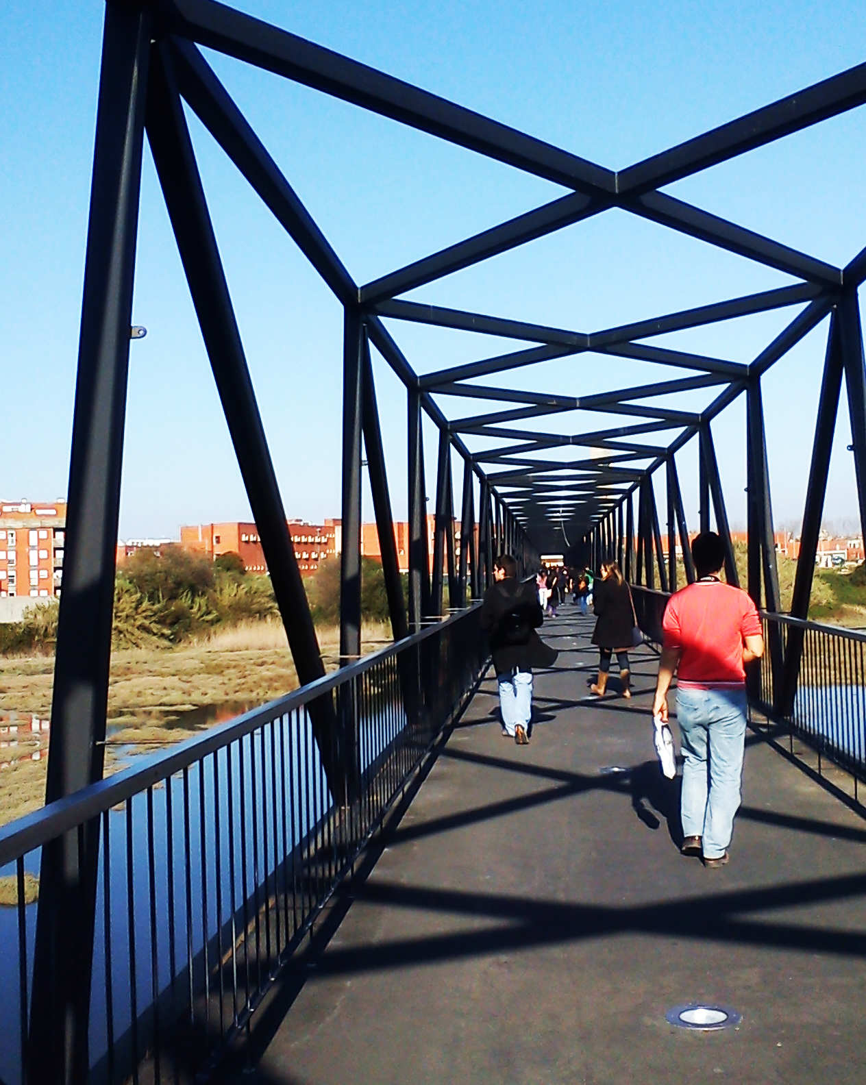 vista do interior da ponte e da zona de Santiago, Universidade de Aveiro, Portugal. Foto de Rita Rodrigues